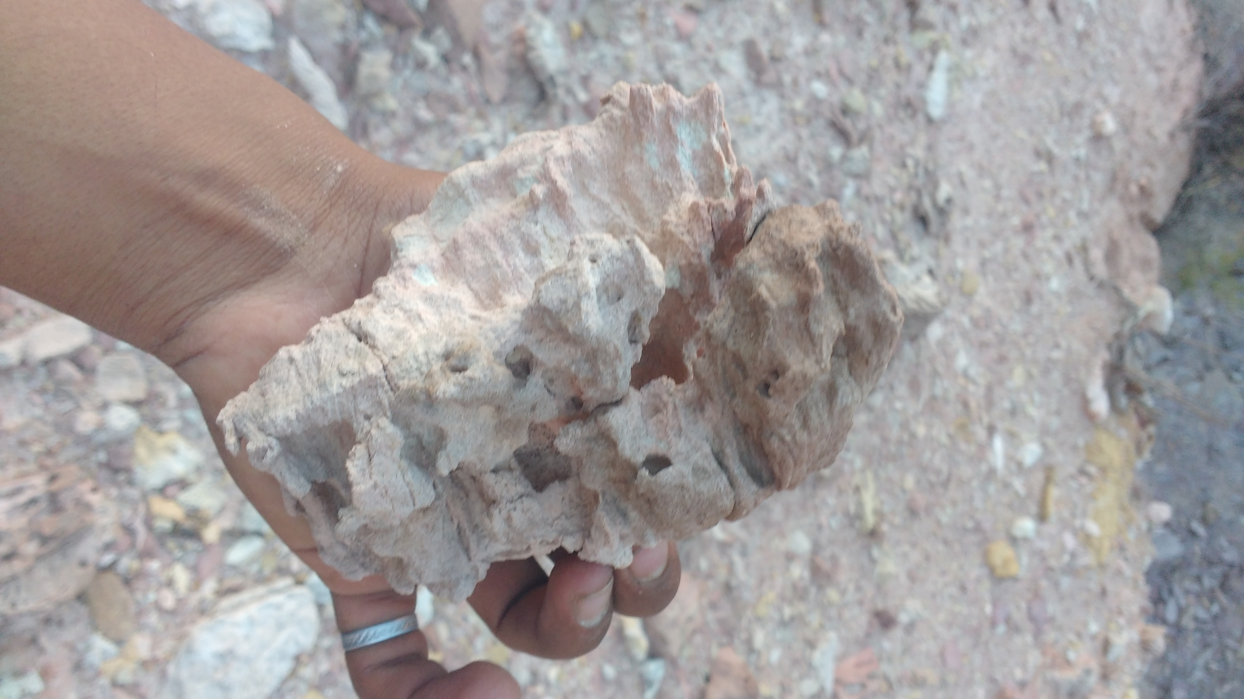 natural. lugares